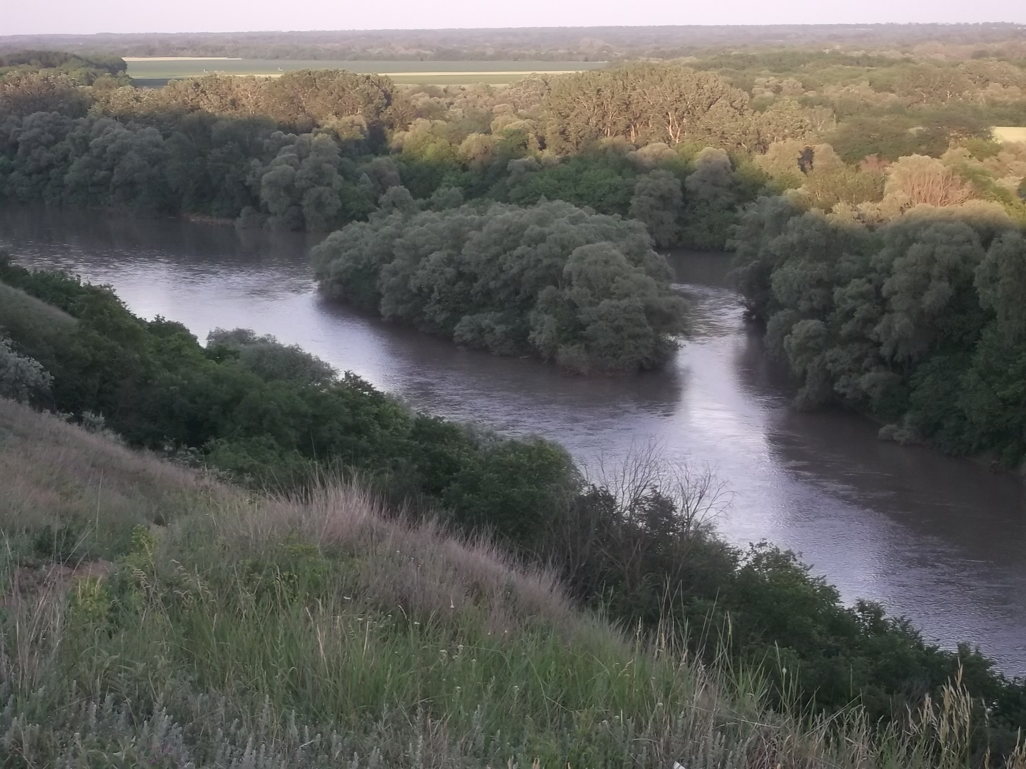 Острова, Тбилисский район This image is related to the protected area of Russia number 2310451